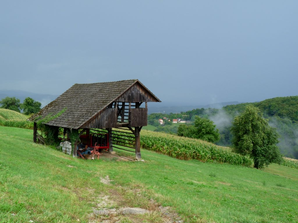 Kozolec Velika Strmica